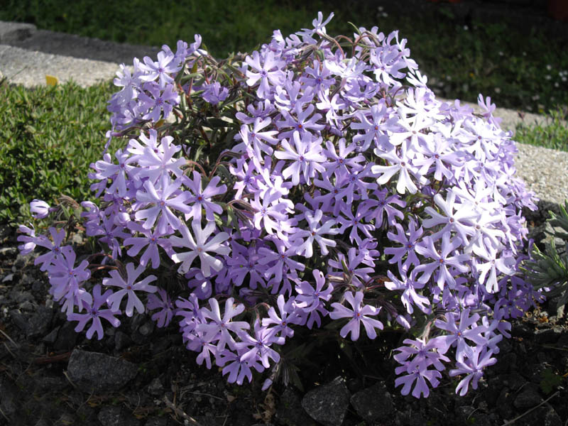 Phlox bifida""